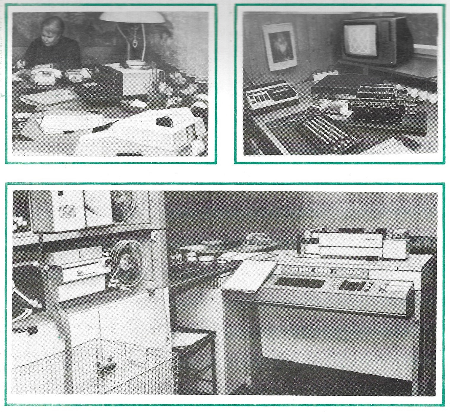 Bürotechnik in der DDR 1985